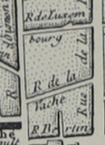 Plan du nord de reims 1775 Moithey